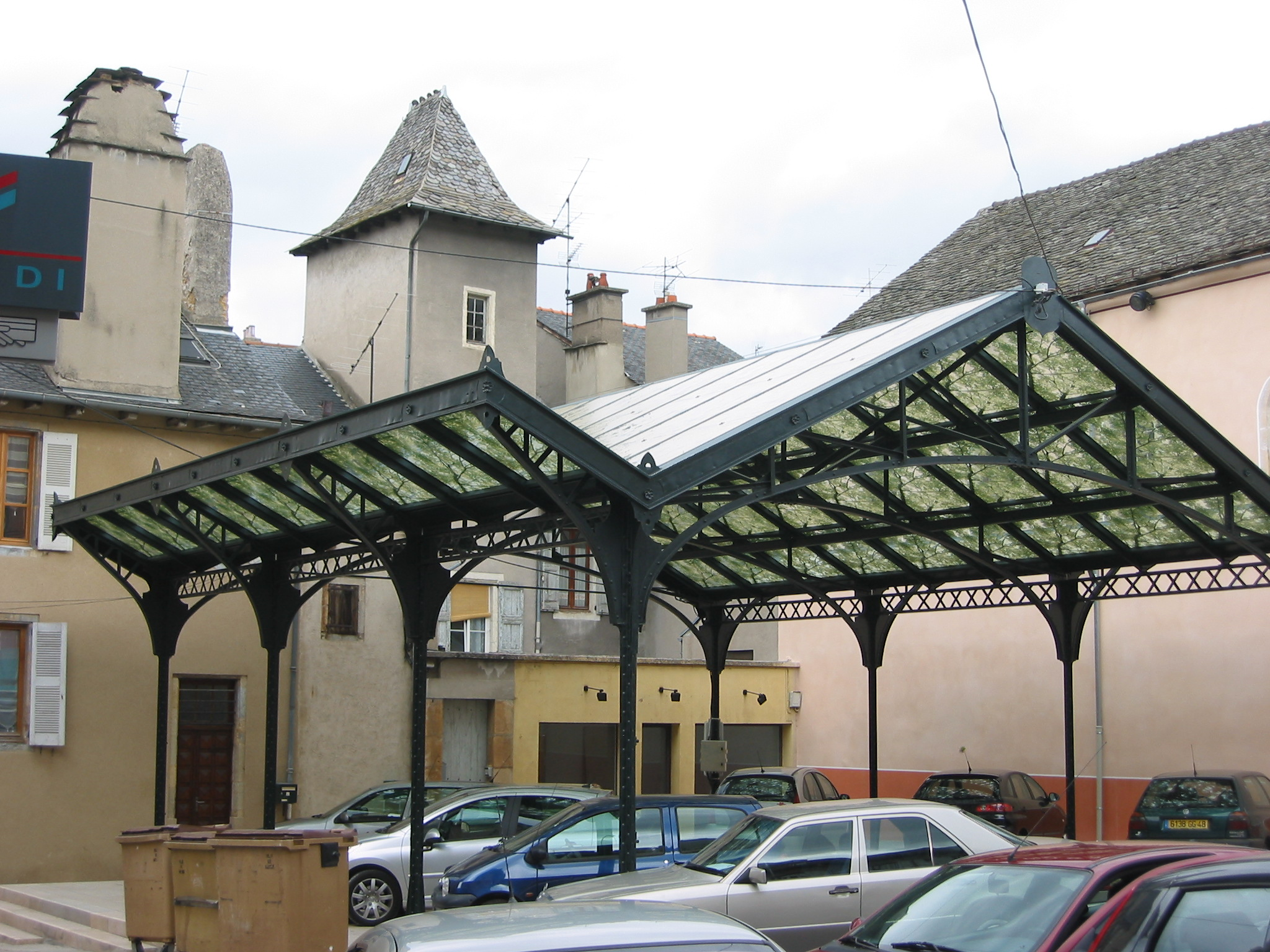 Mende, Lozère, France La Place au blé un 12 août, près de la Tour des Pénitents